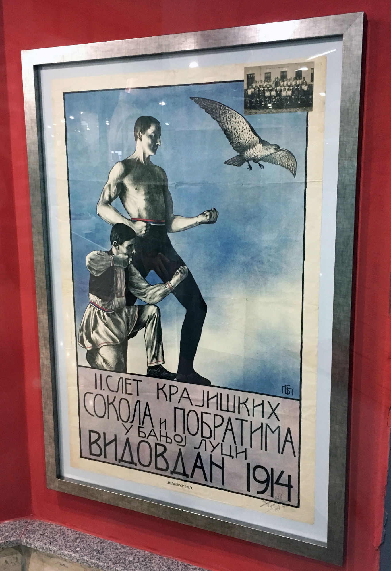 Plakat - II splet krajiških sokolova i pobratima